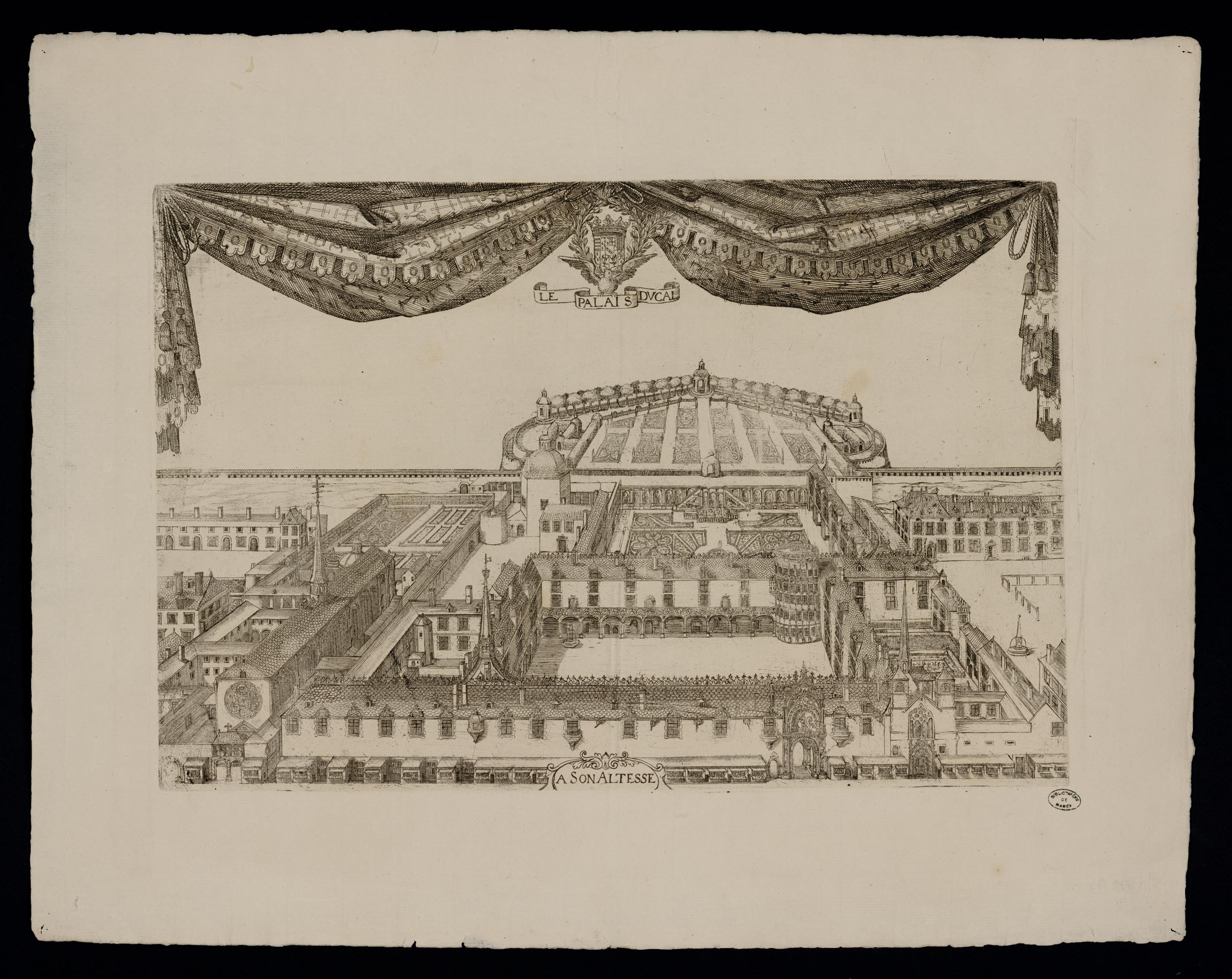 Le Palais Ducal. Gravure à l'eau-forte sur papier vergé, Estampe, 372 x 480 mm (feuille). Bibliothèque-médiathèque de Nancy, M_TS_ES_00104 Plus de détails sur